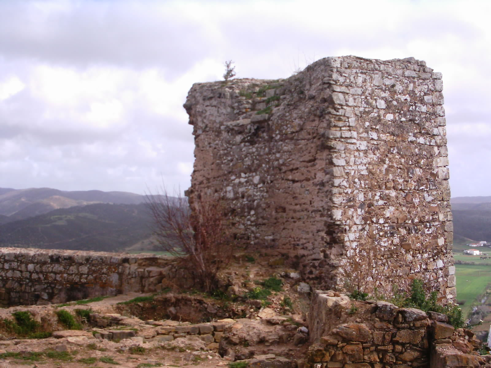 Castelo de Aljezur, Aljezur, Portugal.